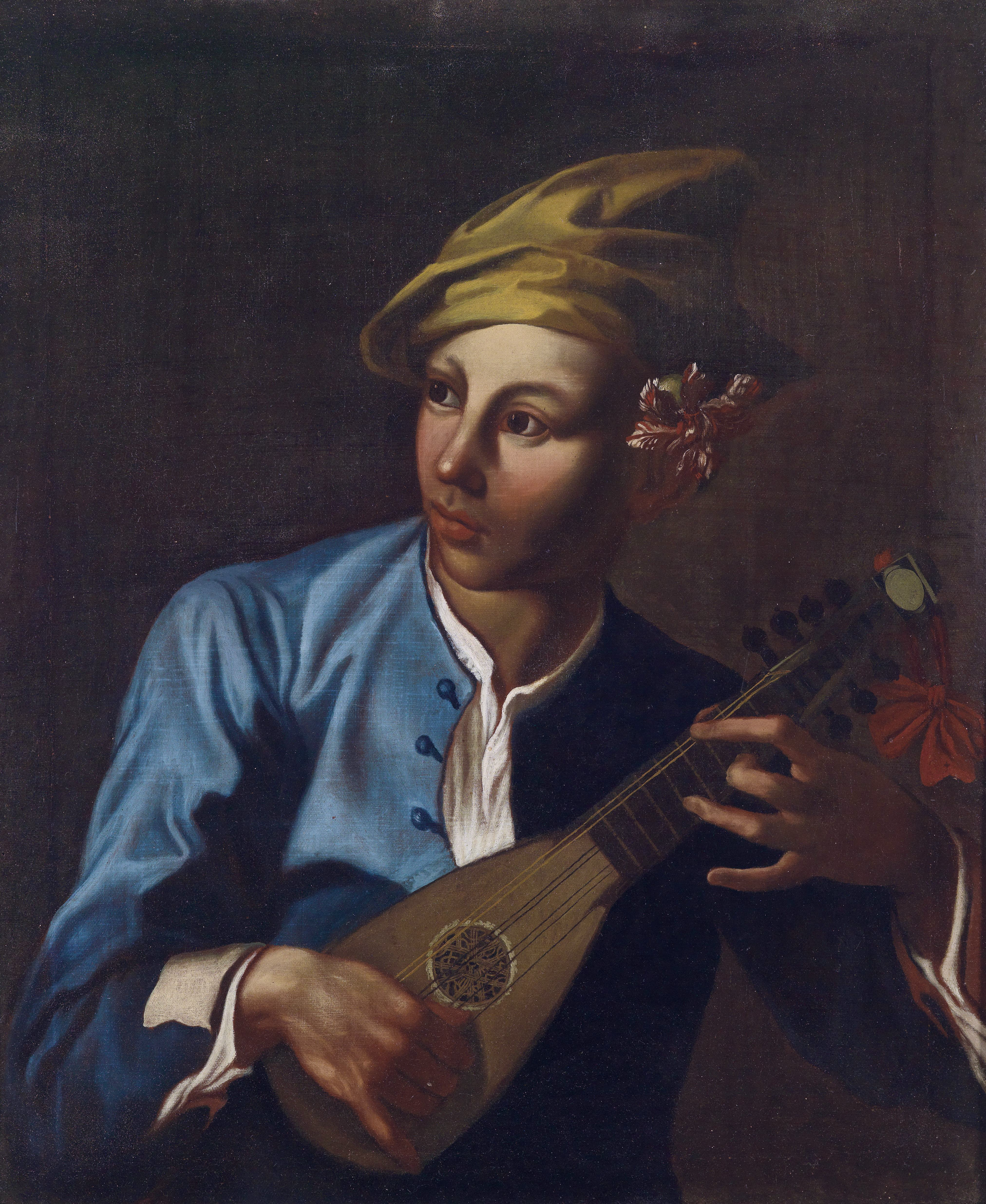 Mandolinenspieler